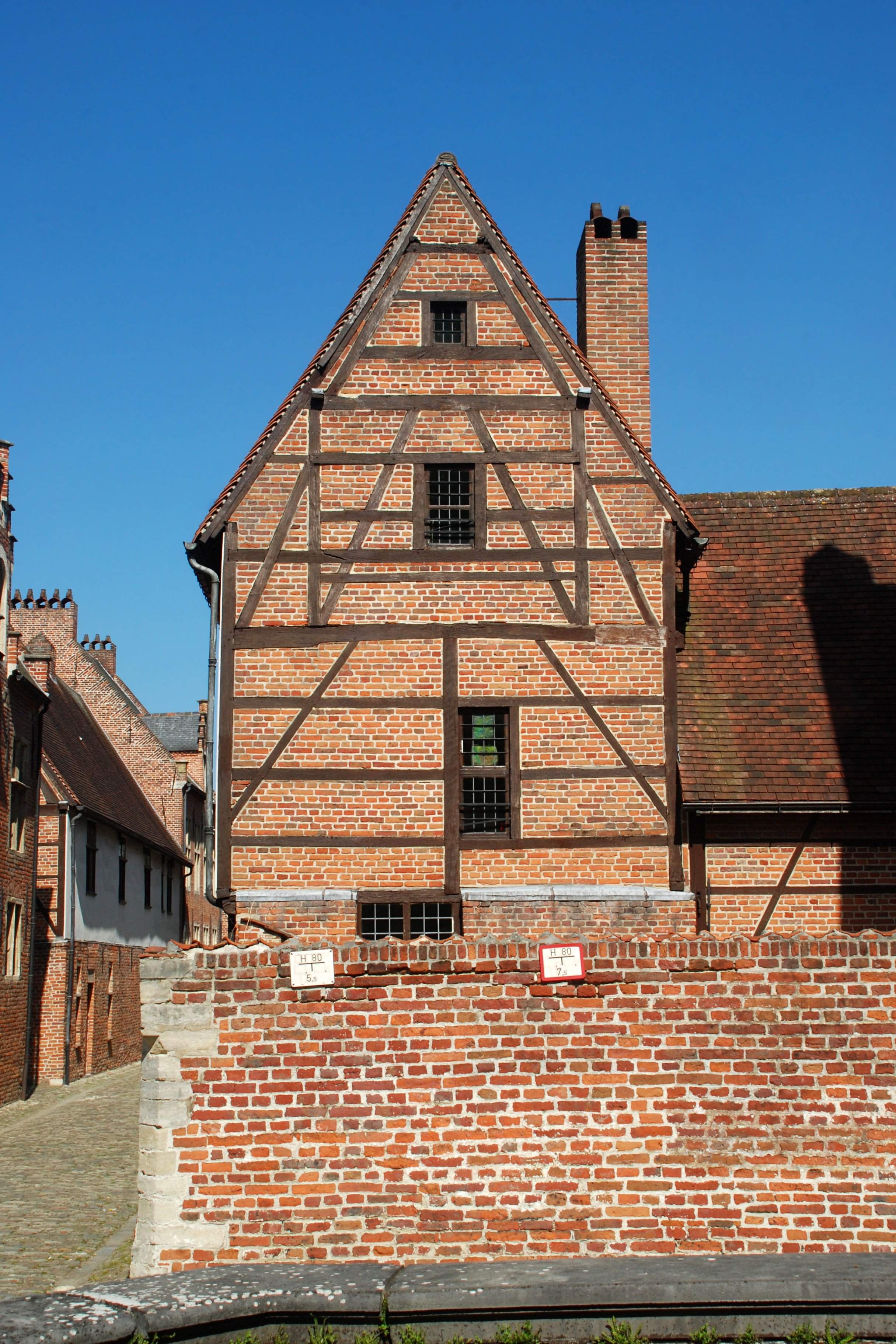 Belgium - Leuven - Groot Begijnhof - n° 72 (Middenstraat) - maison à colombages